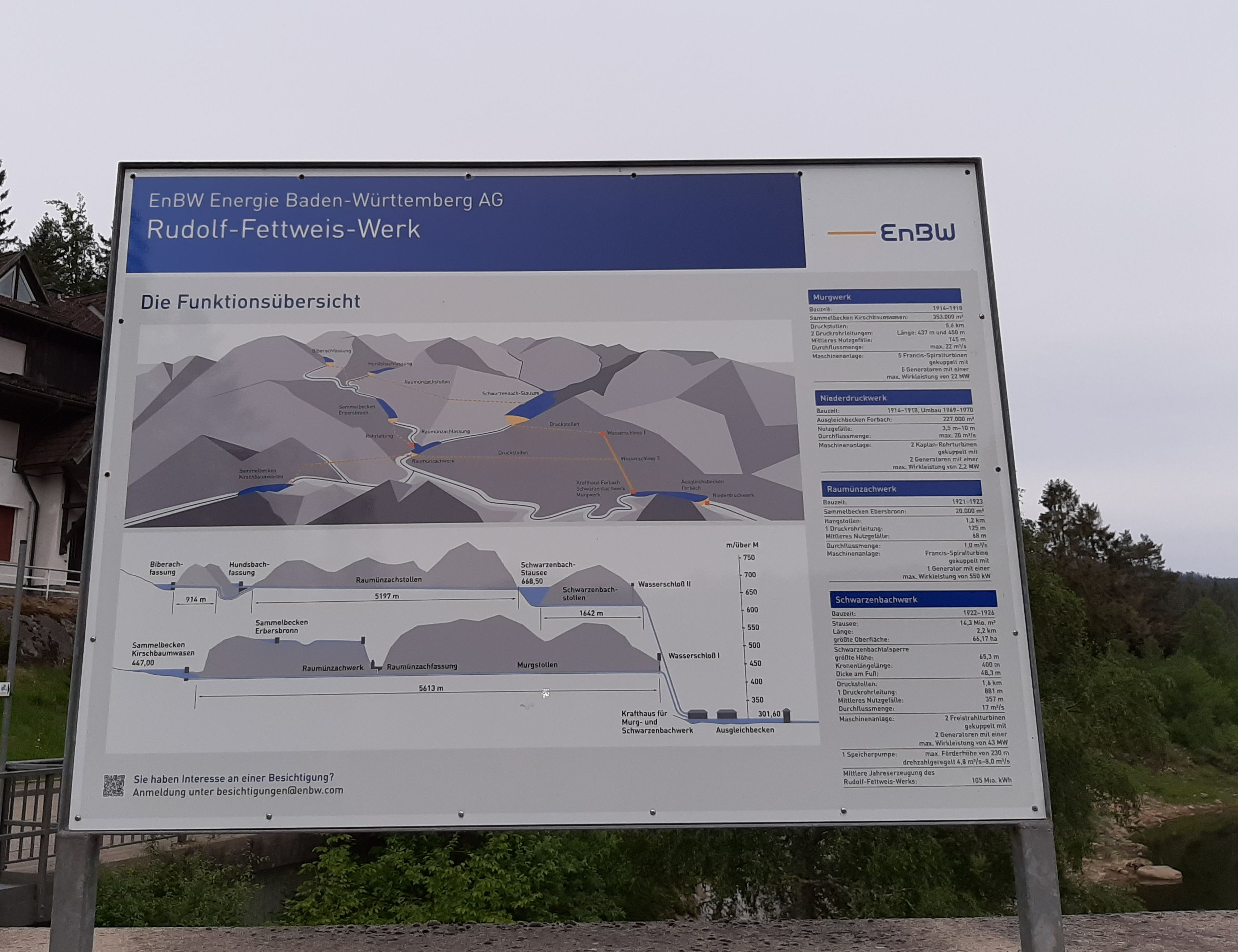 Übersicht über die Elemente des Pumpspeicher- und Laufwasserkraftwerkes "Rudolf Fettweis"